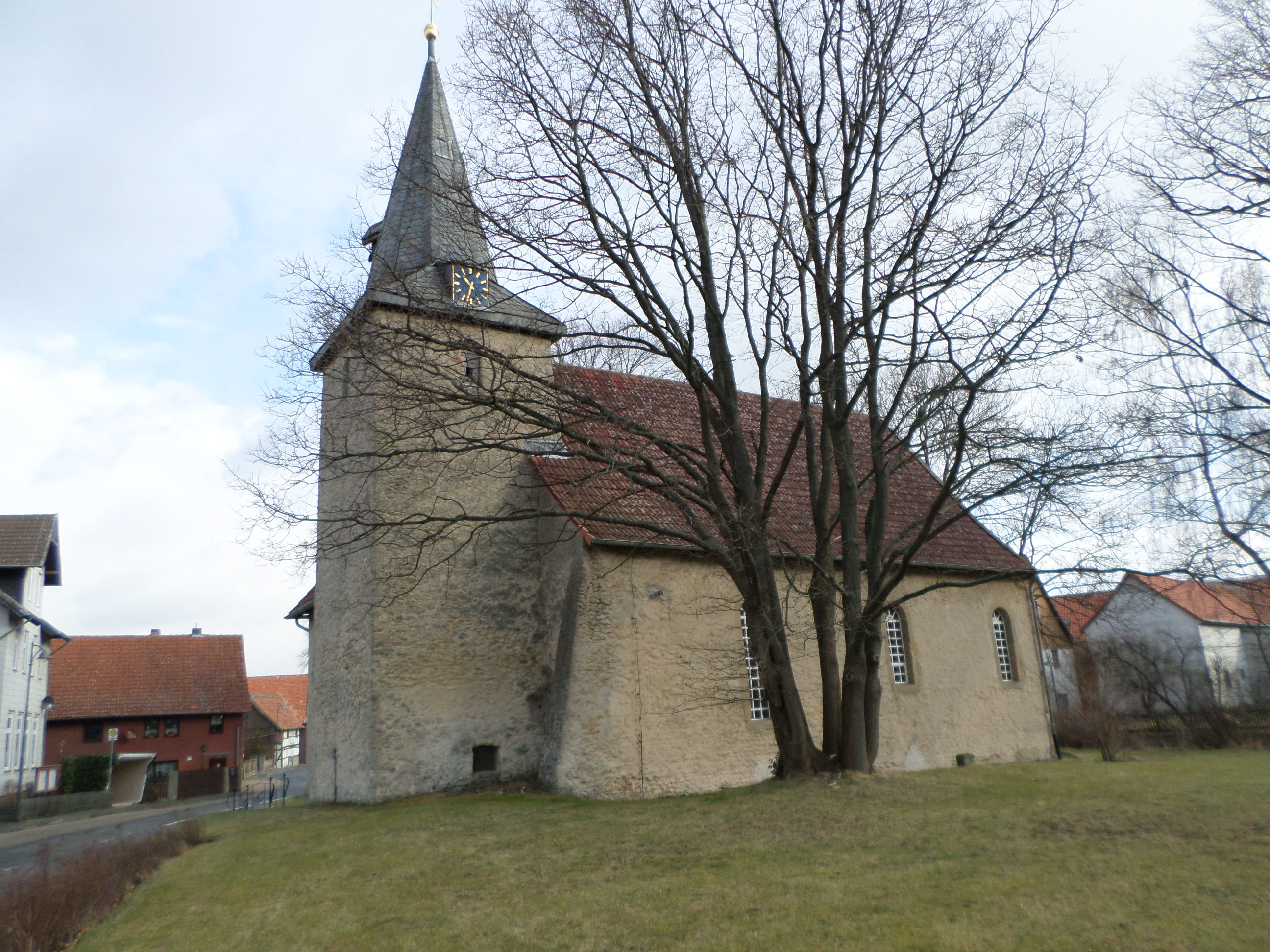 Ev.-Luth. Kirche zu Bettingerode